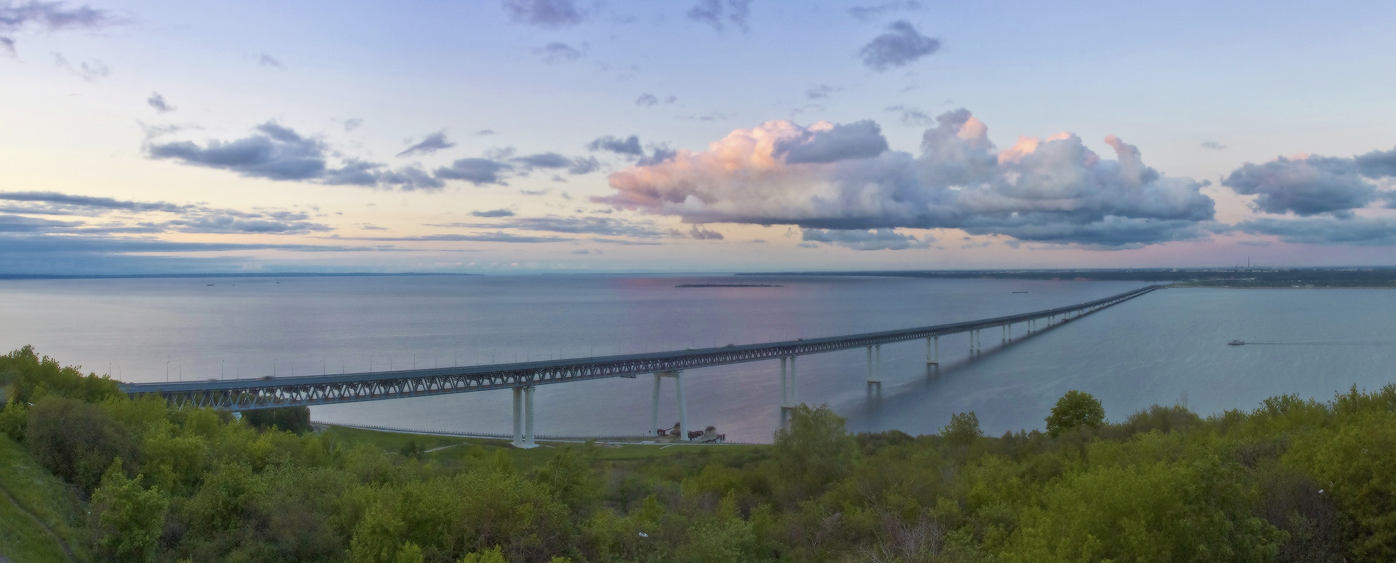 Президентский мост через р. Волгу в Ульяновске